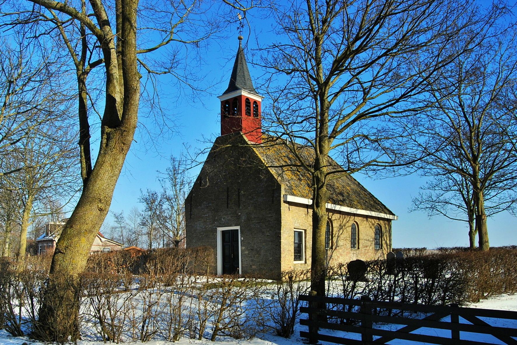 Tsjerke fan Nijhuzum